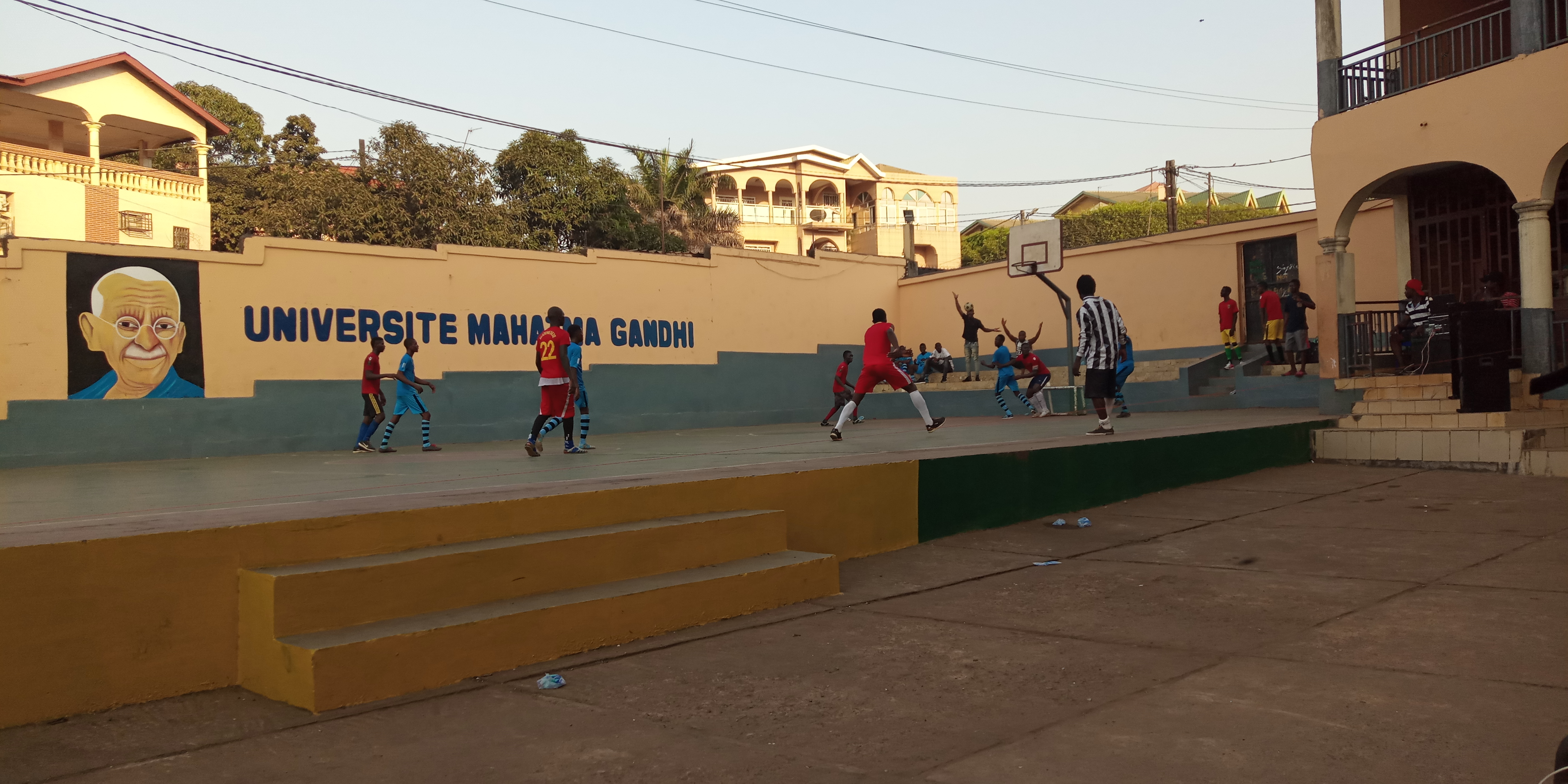 Match de gala organisé par une ONG